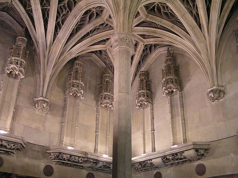 Chapelle de l'hôtel de Cluny Paris musée national du Moyen age